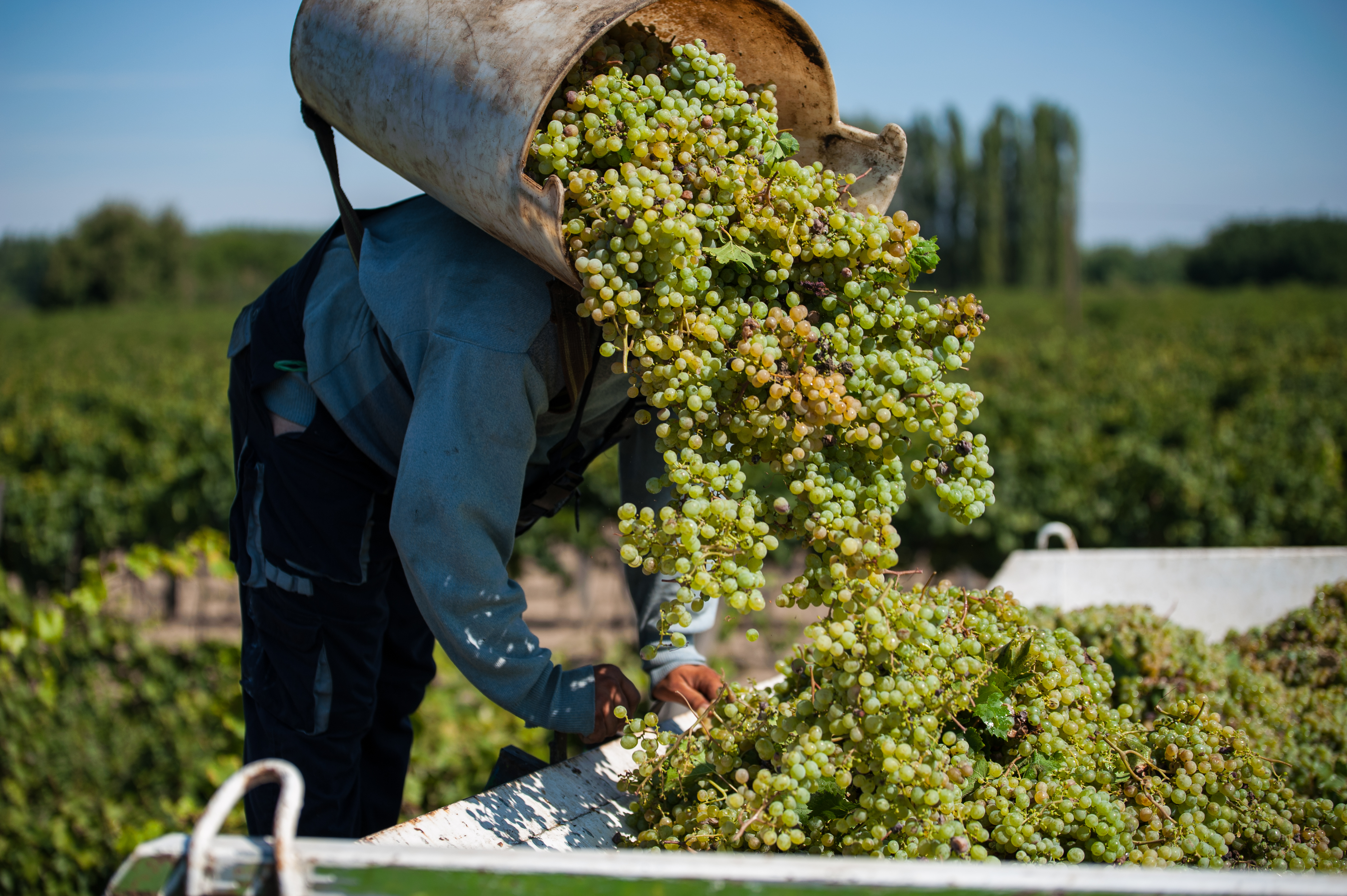 Szüret